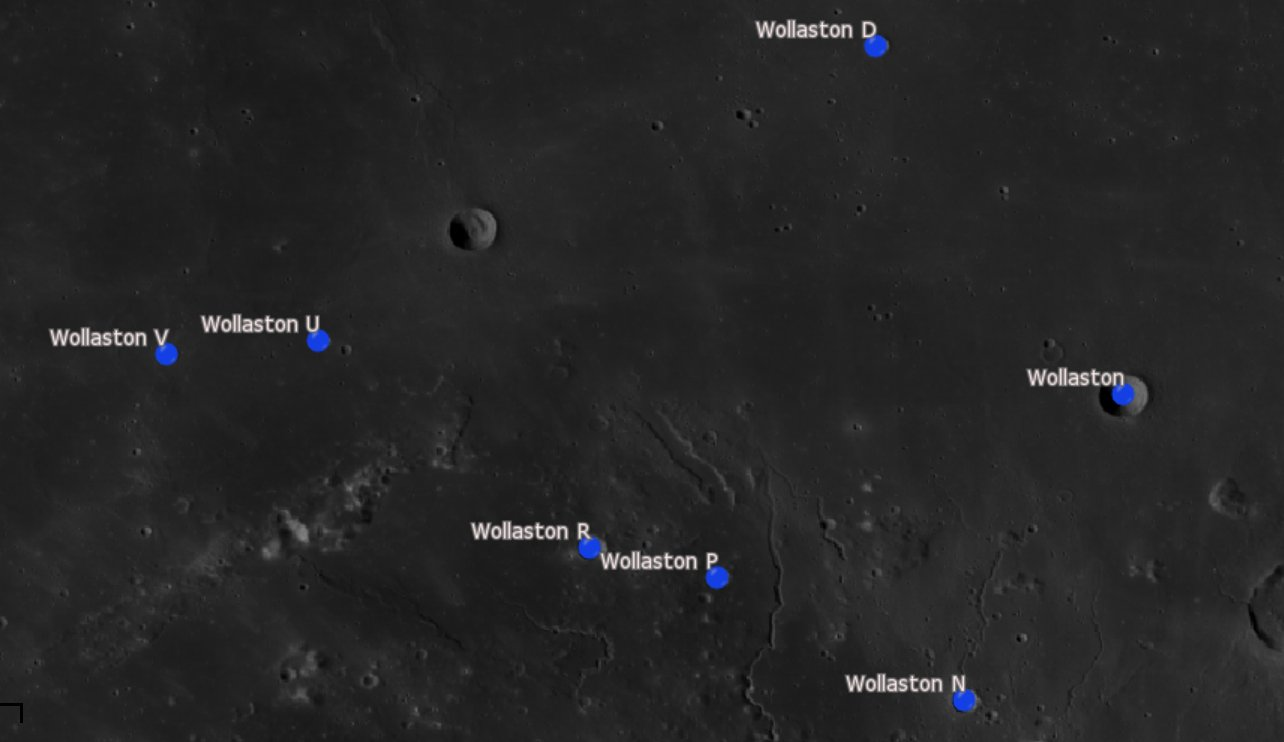 Cráter lunar Wollaston. Cráteres satélite. (Imagen LRO)